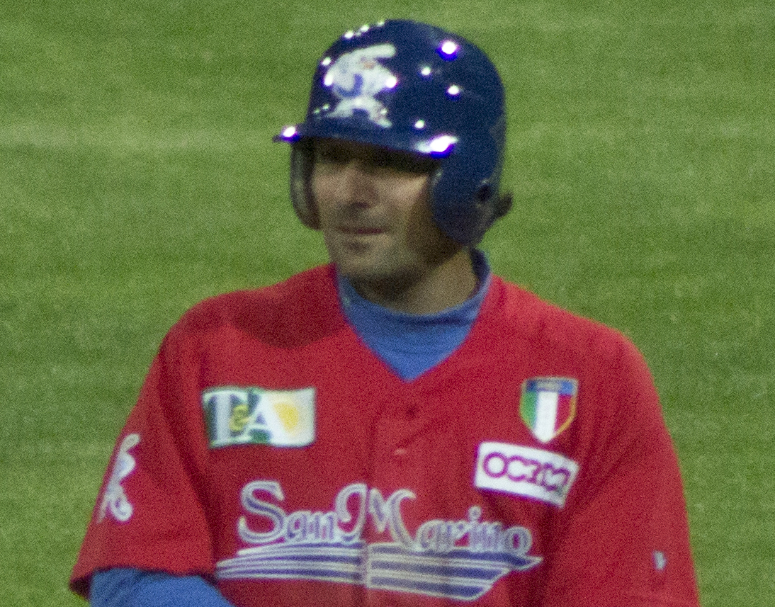 Lorenzo Avagnina durante San Marino-Rimini, gara valida per l'Italian Baseball League 2013. Foto scattata da me dagli spalti con obiettivo 70-300.